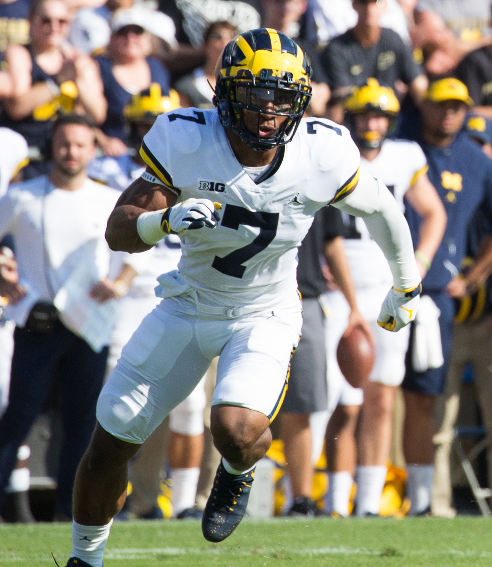 PAB_MichiganAtPurdue2017_55